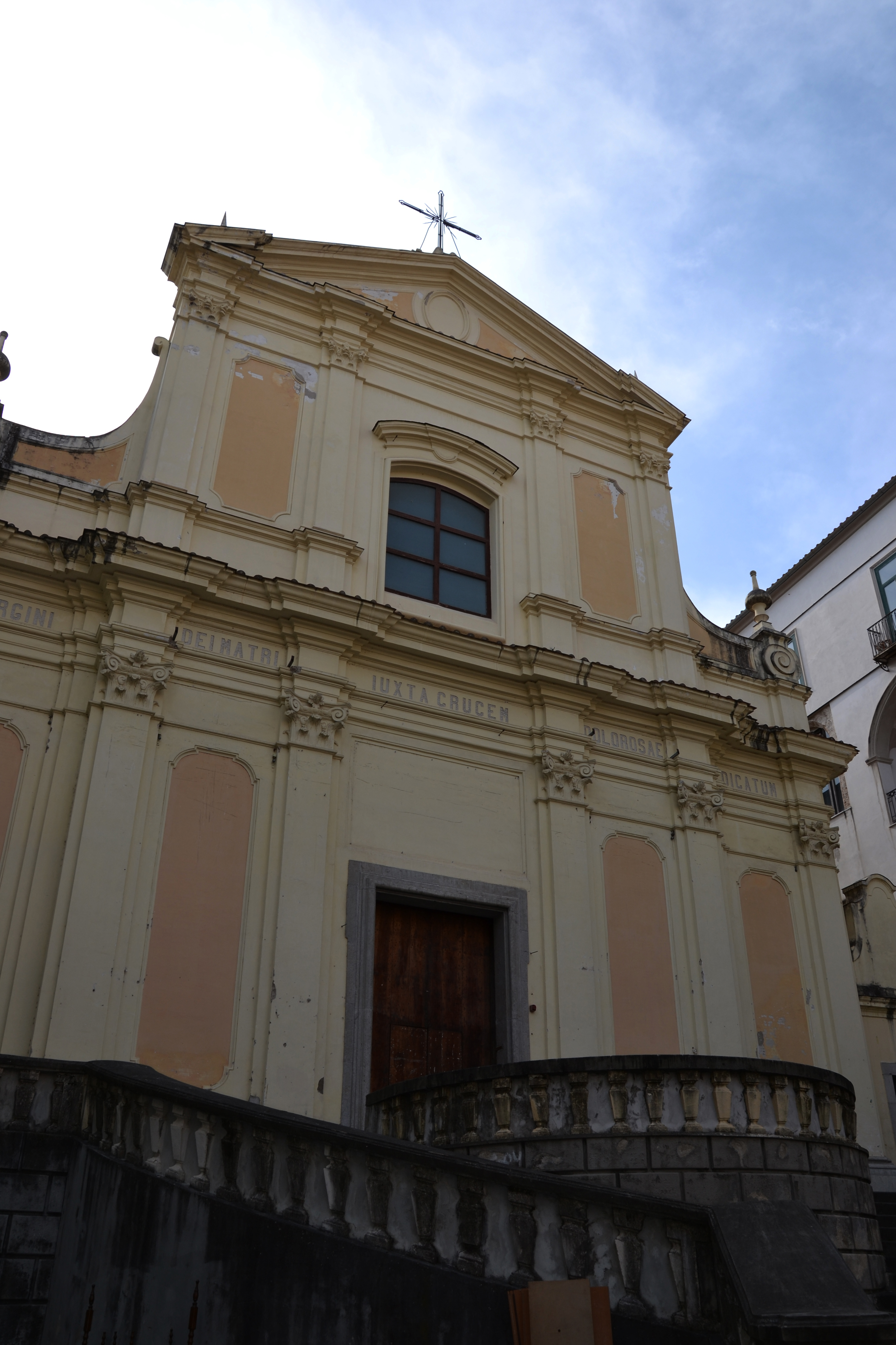 Vista della chiesa di Santa Sofia